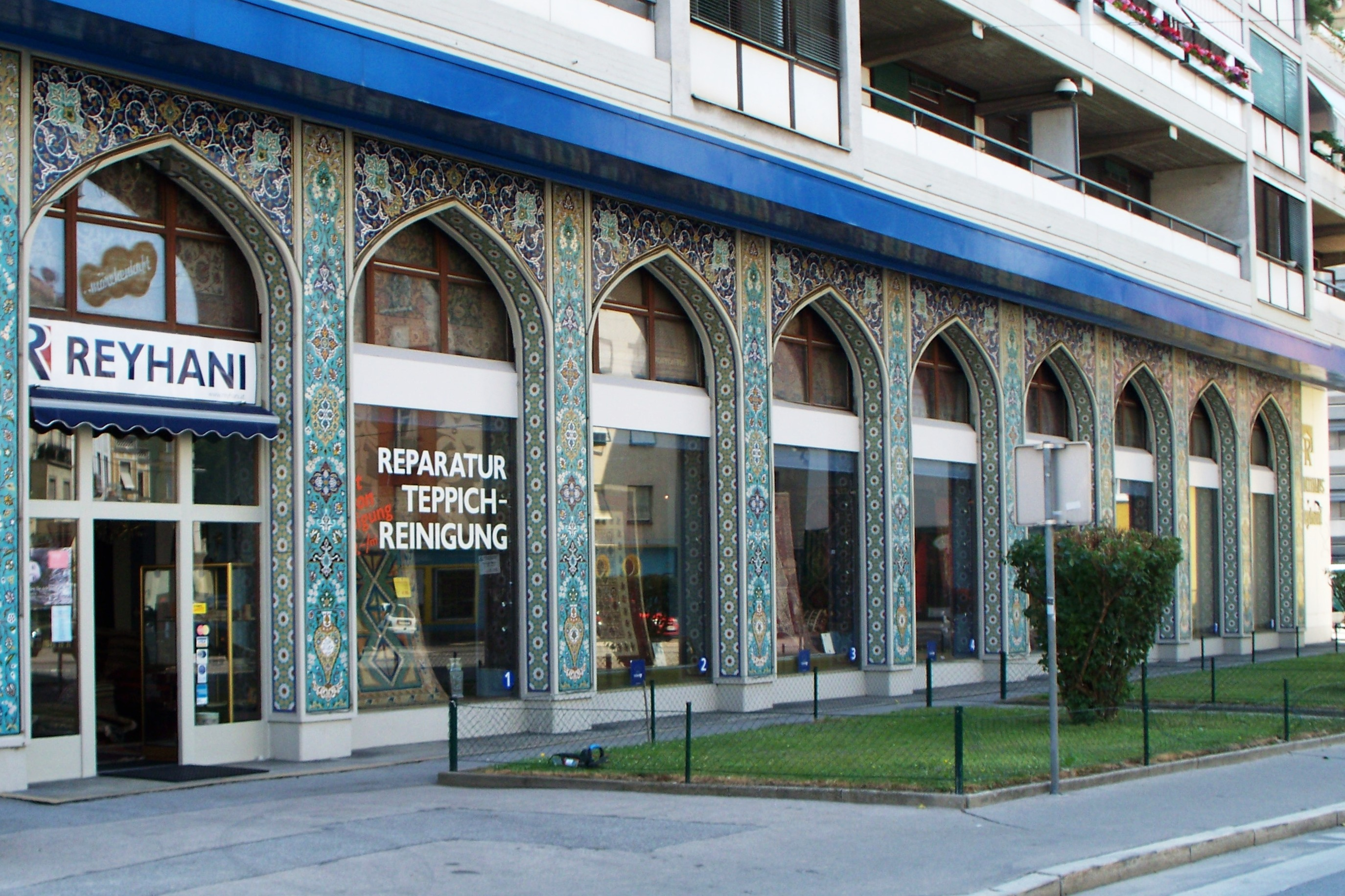 Mosaik-Fassade des Teppichhauses Reyhani in Graz (2010)